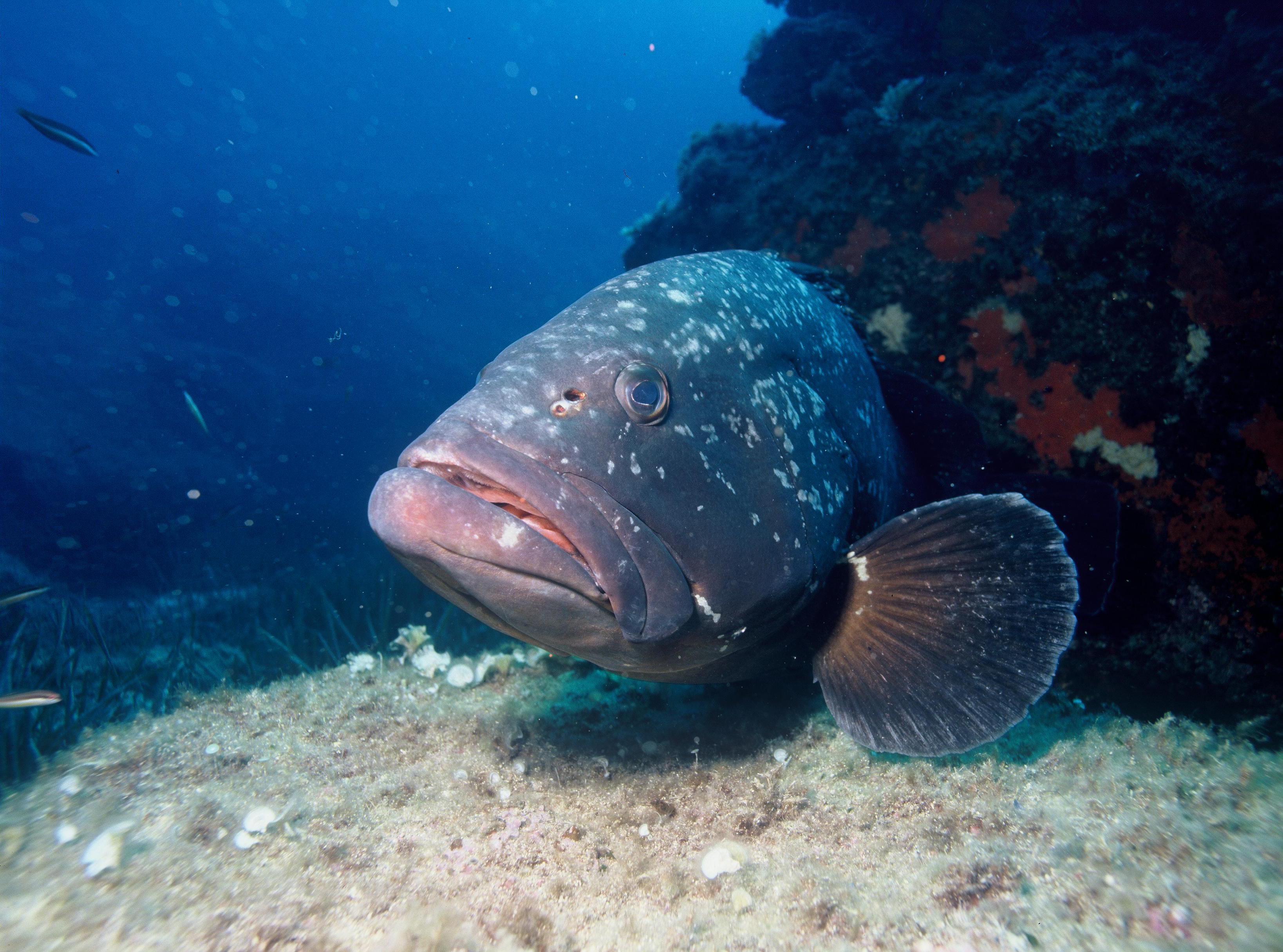 Epinephelus marginatus, Synonym: Epinephelus guaza